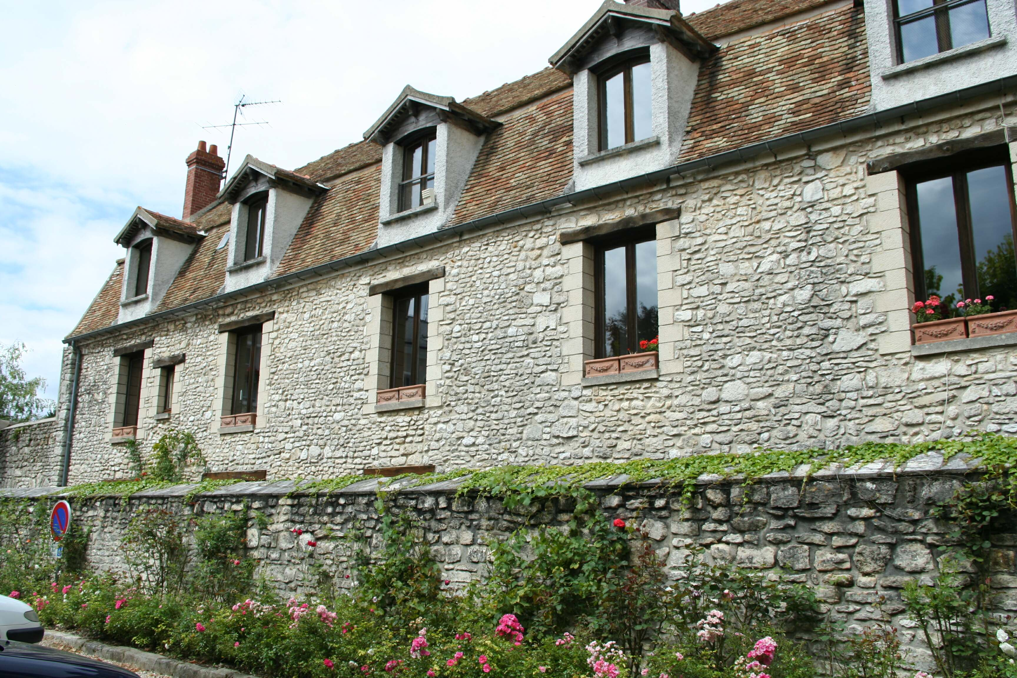 Fauconnerie du Roy à Montainville, Yvelines (France)